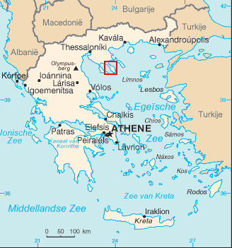 Oorspronkelijk uit CIA Factbook; vertaald in Nederlands door Danielm; omgezet in PNG door BenTels, enkel Sithonia met rood gemarkeerd door mij